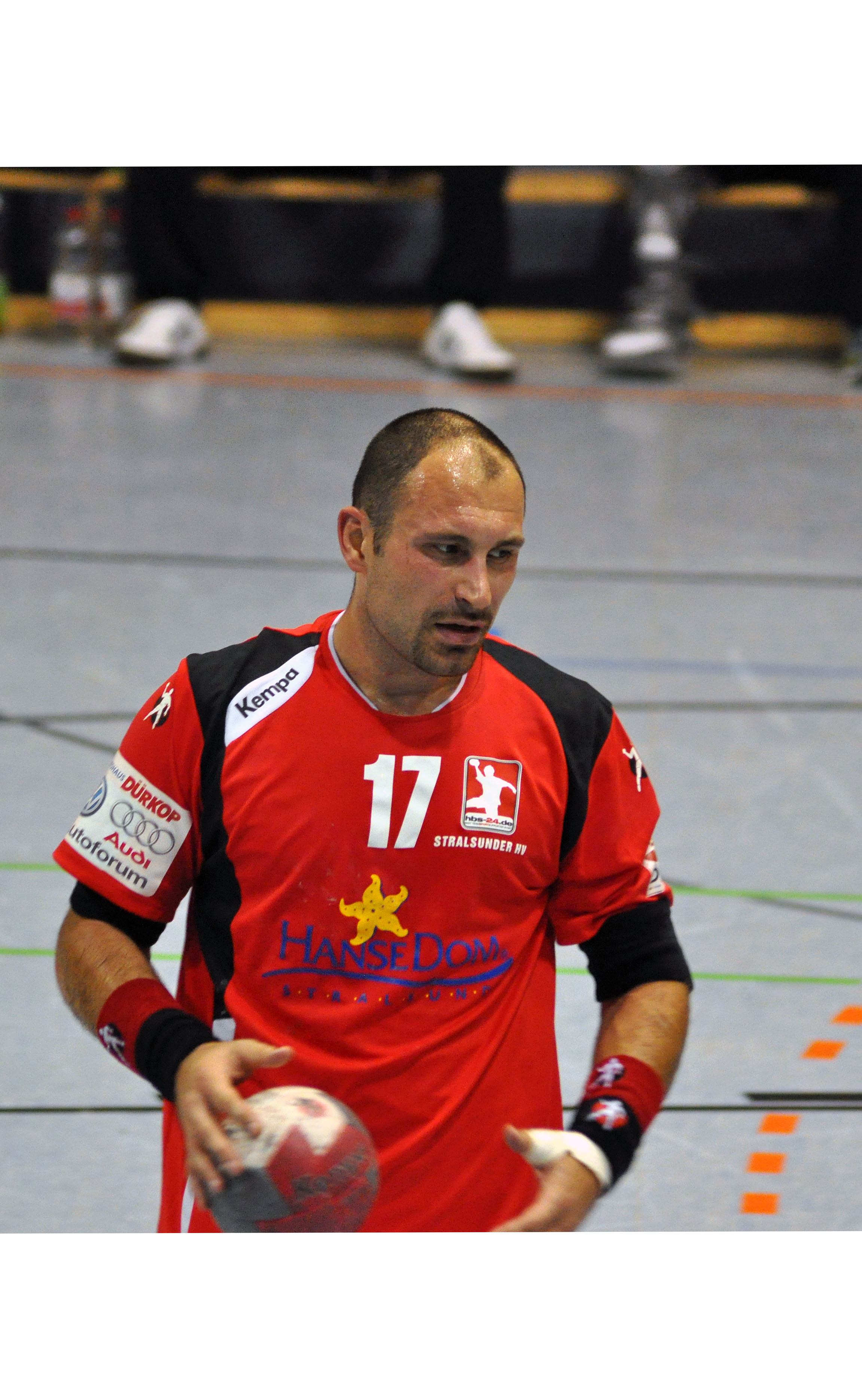 Die Fotos entstanden am 2. Spieltag der 3. Liga, Staffel Nord. Die Begegnung zwischen dem Stralsunder HV und den Wölfen Tarp-Wanderup in der Vogelsanghalle Stralsund endete 27:30.